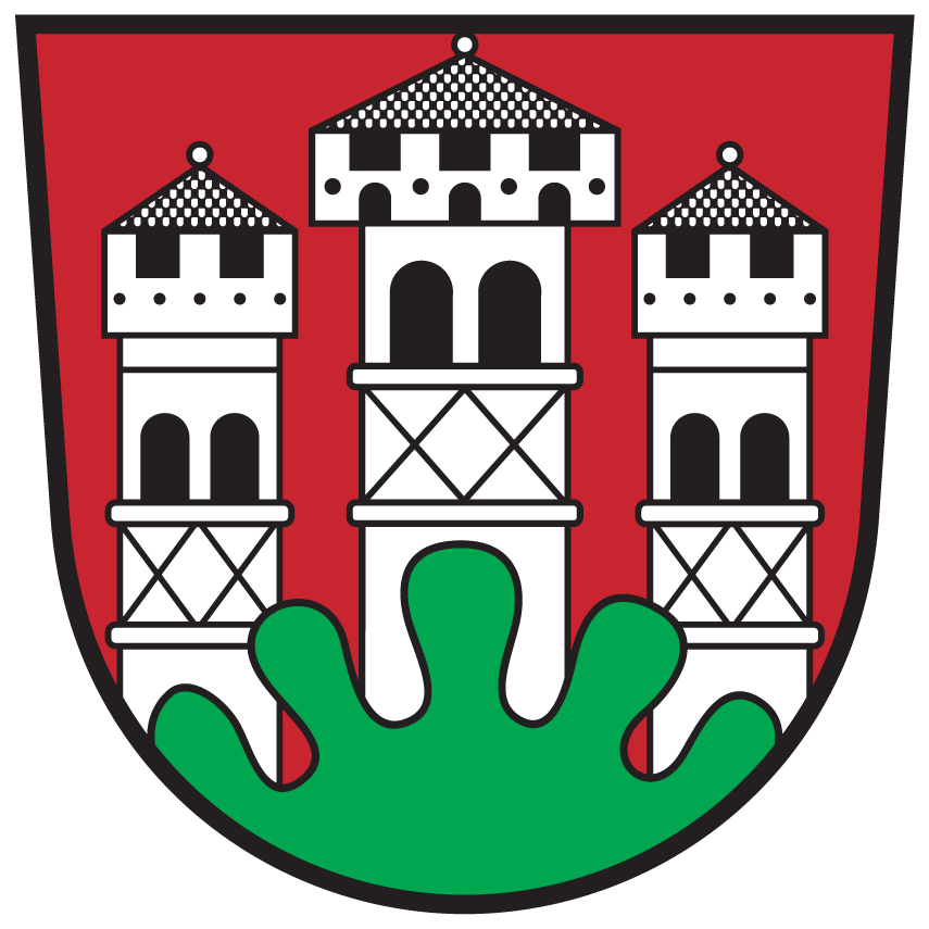 Wappen von Völkermarkt